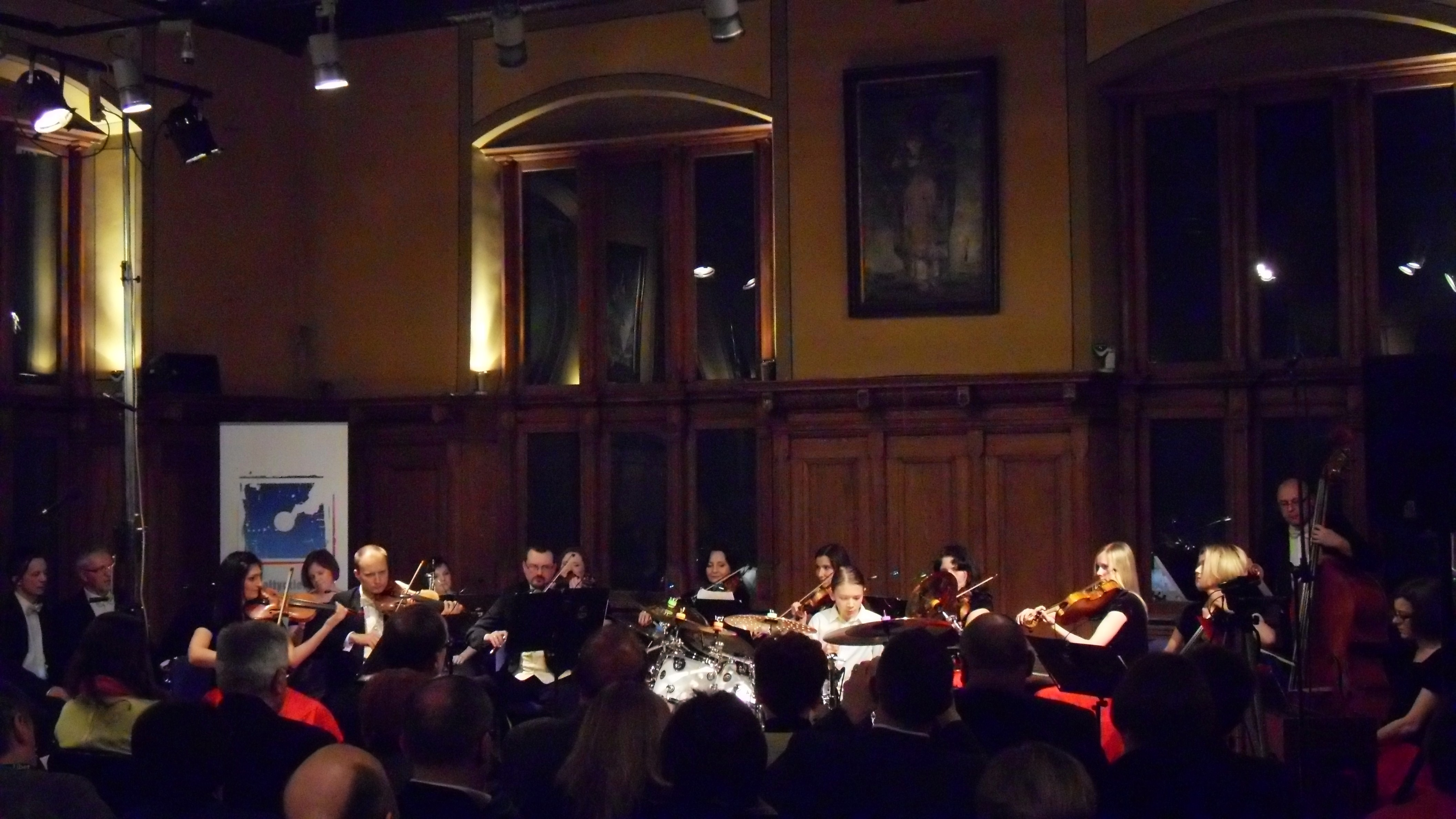 "Cappella Gedanensis" w Ratuszu Starego Miasta w Gdańsku, w Wielkiej Sali.